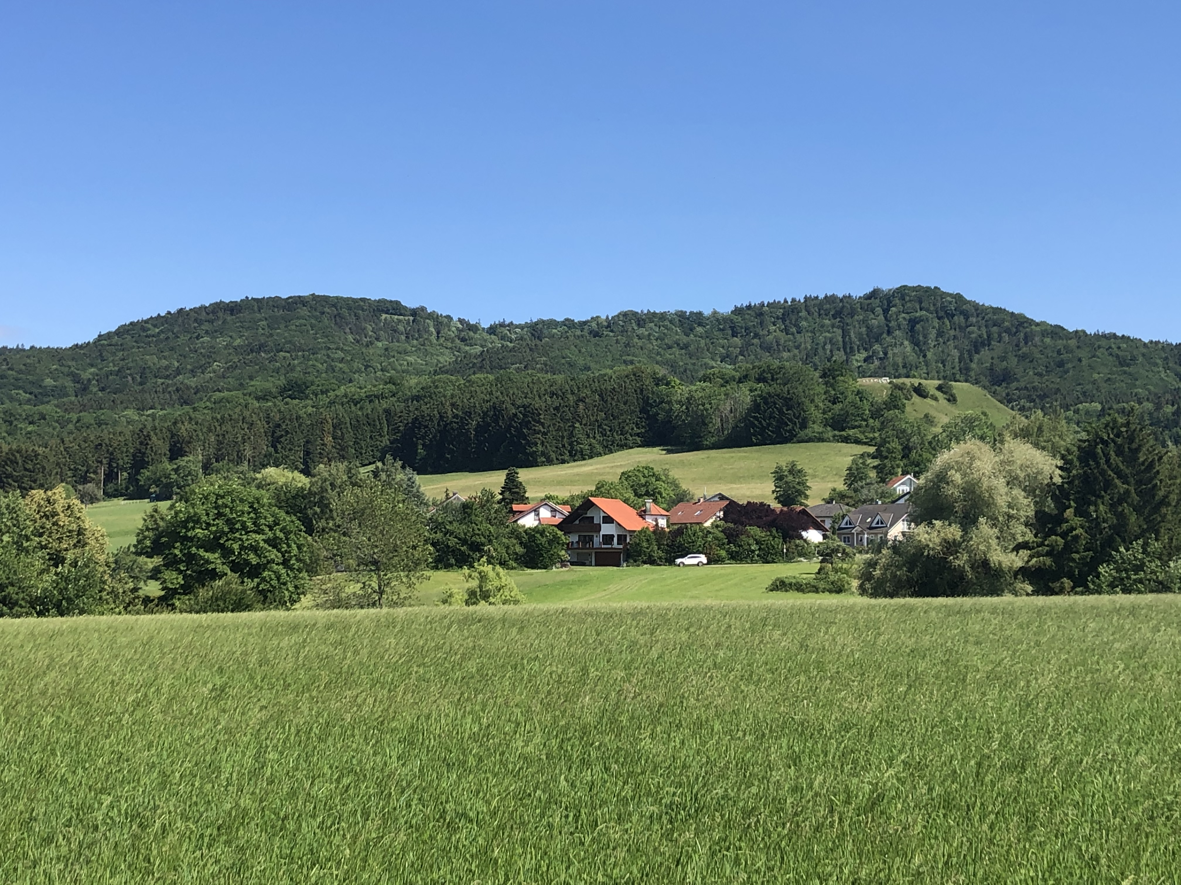 Blasenberg links, Heiligenkopf rechts, im Vordergrung Bisingen-Thanheim